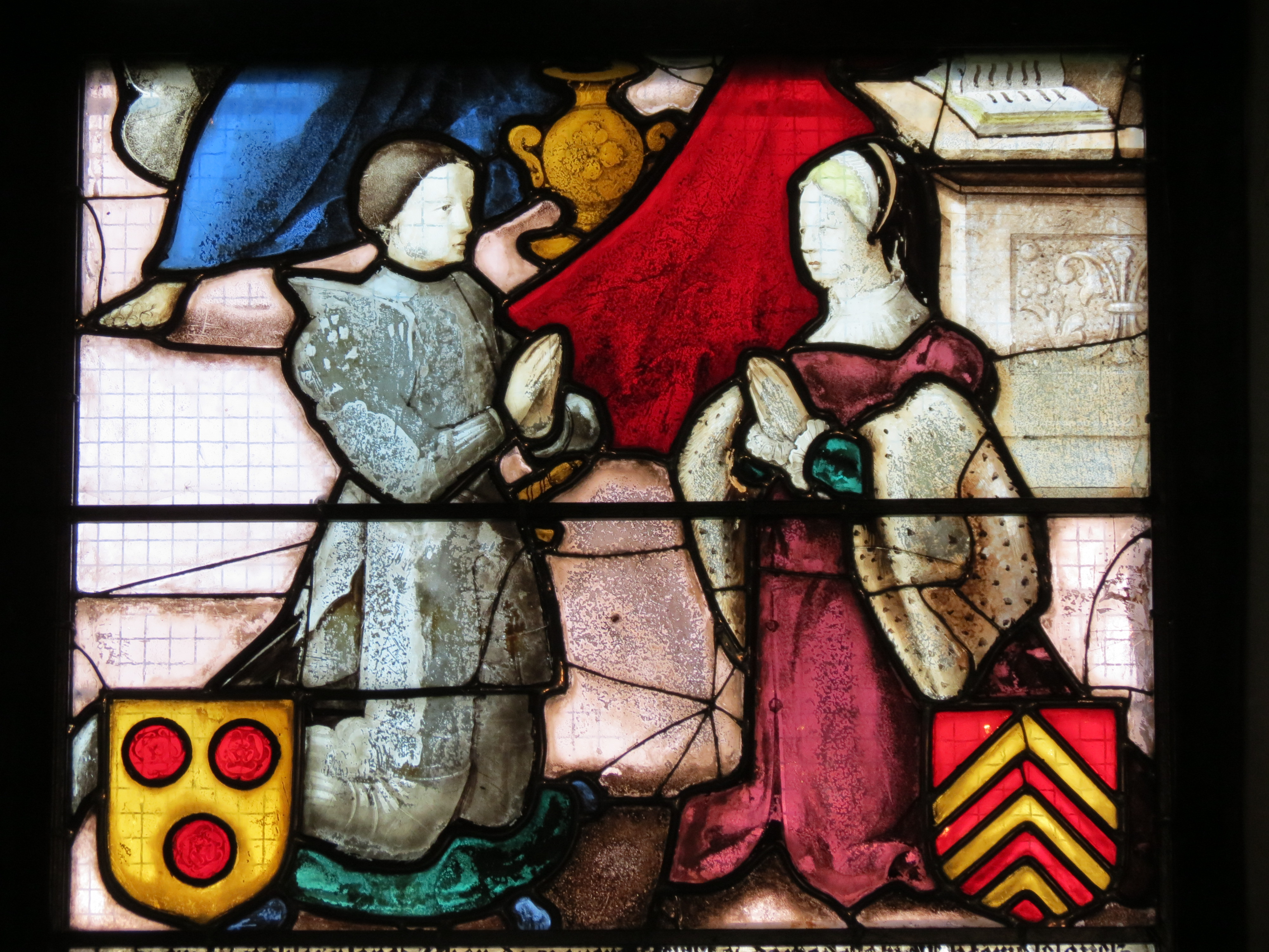 Église Saint-Martin de Bézu-la-Forêt.